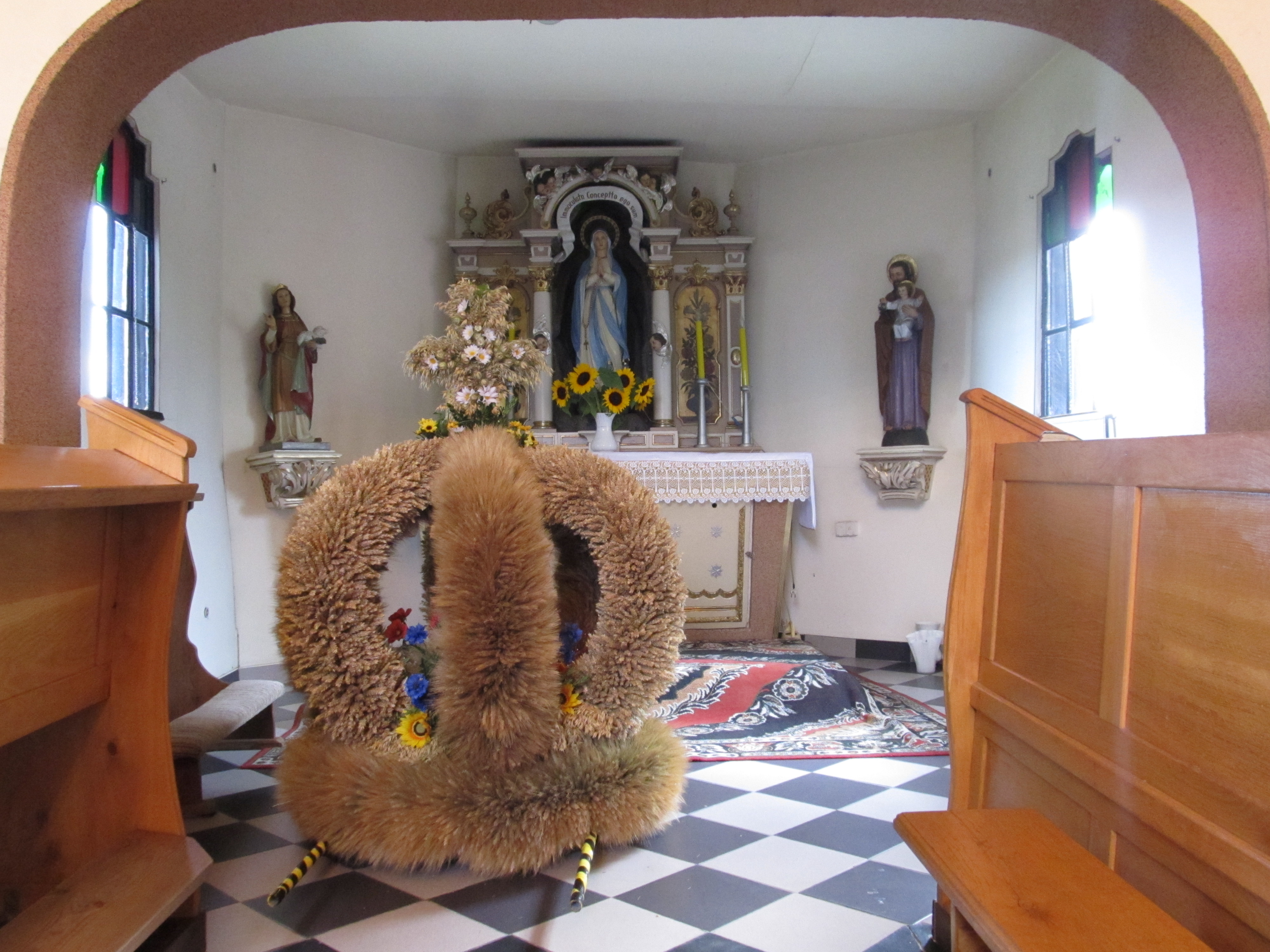 Kościół filialny p. w. św. Michała, drewniany; Księży Las, ul. Wiejska, gmina Zbrosławice, powiat tarnogórski